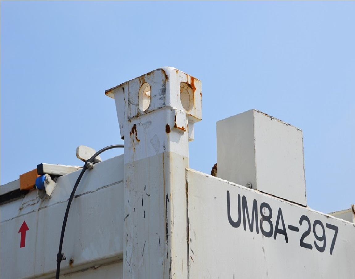 大島元町港 ⇔ 東京都の辰巳埠頭間の船舶用輸送用に特別に用意された、土石流瓦礫輸送専用の長さが12ftサイズで、5t積みコンテナ。 《 大島元町地区内にて、帰属者本人が撮影。 》